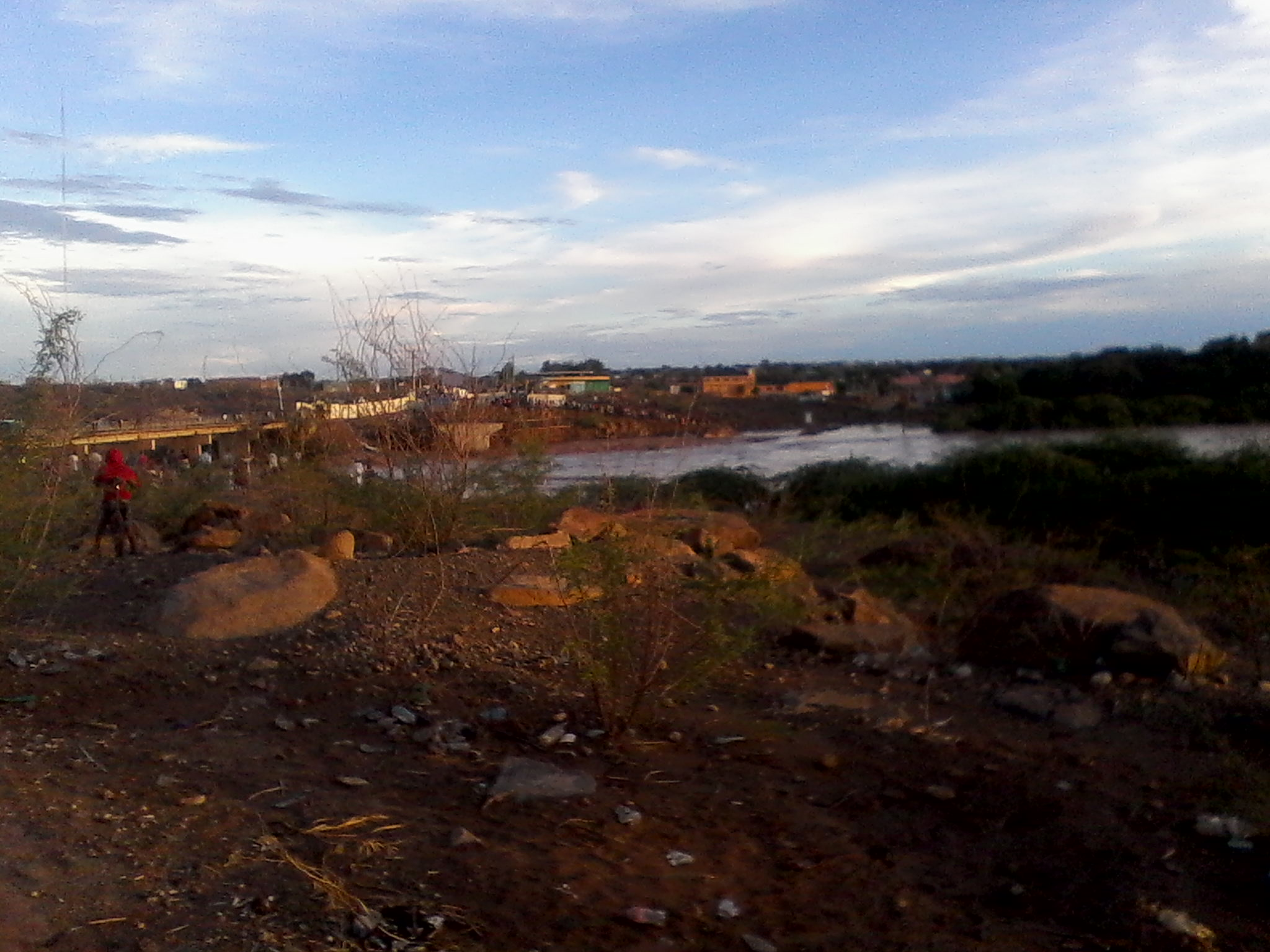 Kiswahili: Mto wa Turkwell, Lodwar jijini.